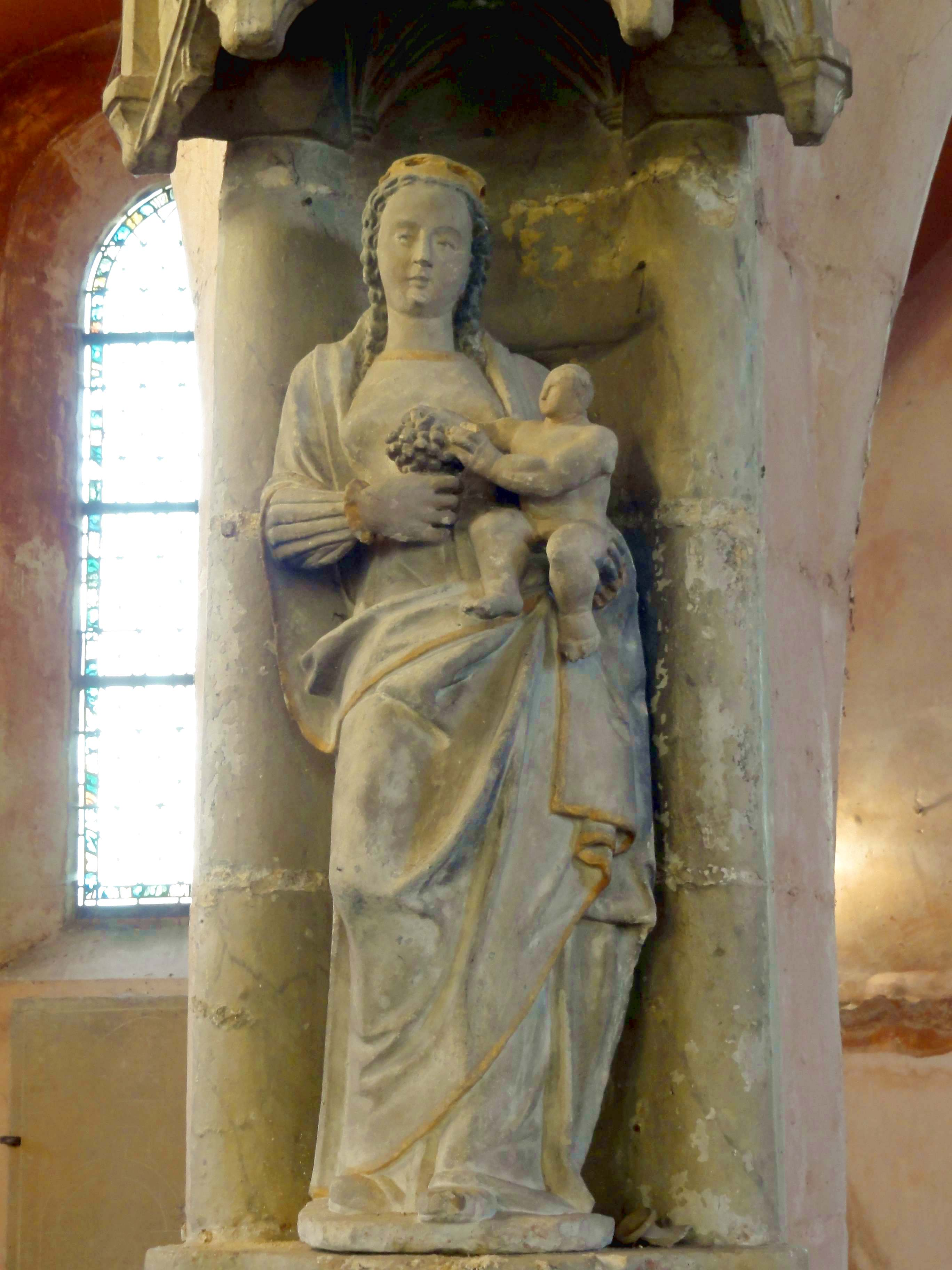 Mobilier de l'église - voir titre.